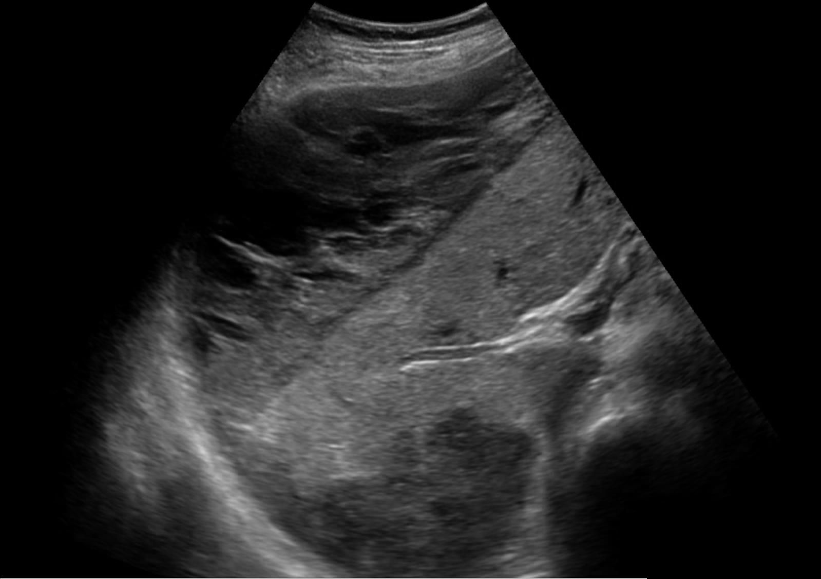 Großes subkapsuläres Hämatom der Leber bei einer Frau mit HELLP-Syndrom.